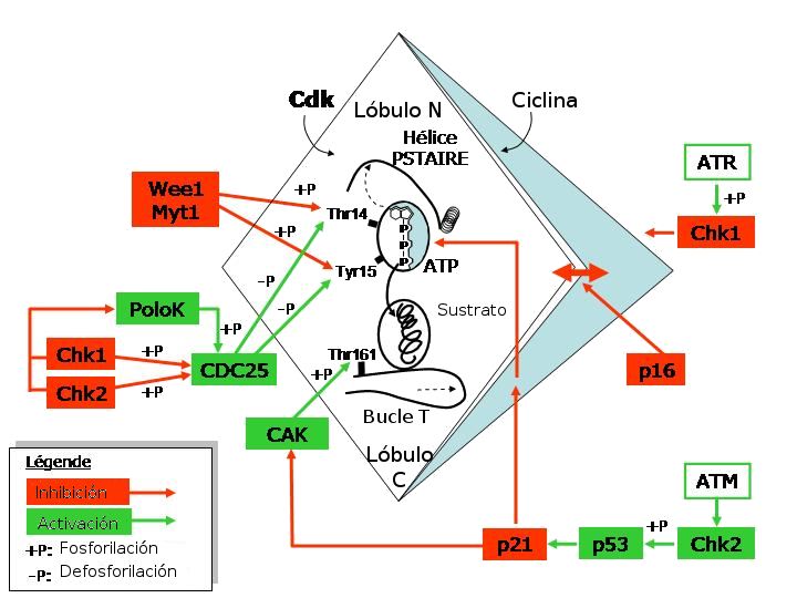 Description: Les mécanismes du cycle cellulaire: Les complexes Cdk-Cycline et les kinases activatrices et réductrices.; Mecanismos del ciclo celular; complejos ciclina-Cdk y kinasas asociadas